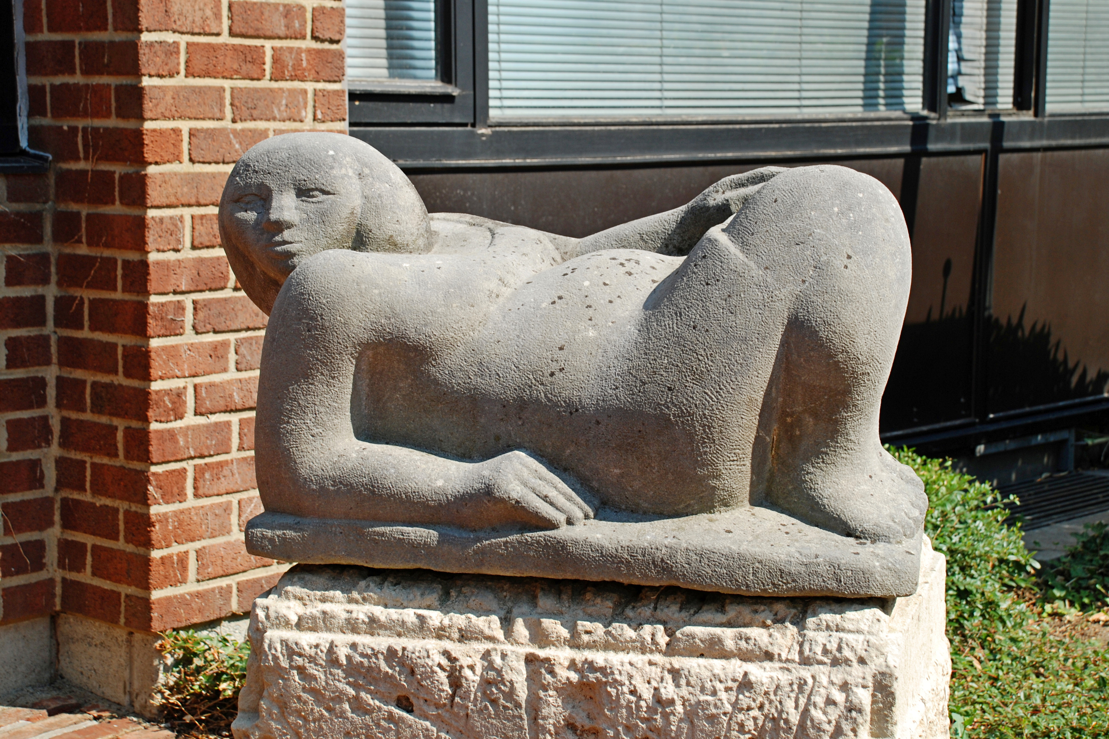 Belgique - Louvain-la-Neuve - rue Archimède - Bonheur - Jean-Marie Abel (2003) This photo of immovable heritage has been taken in the Walloon Region